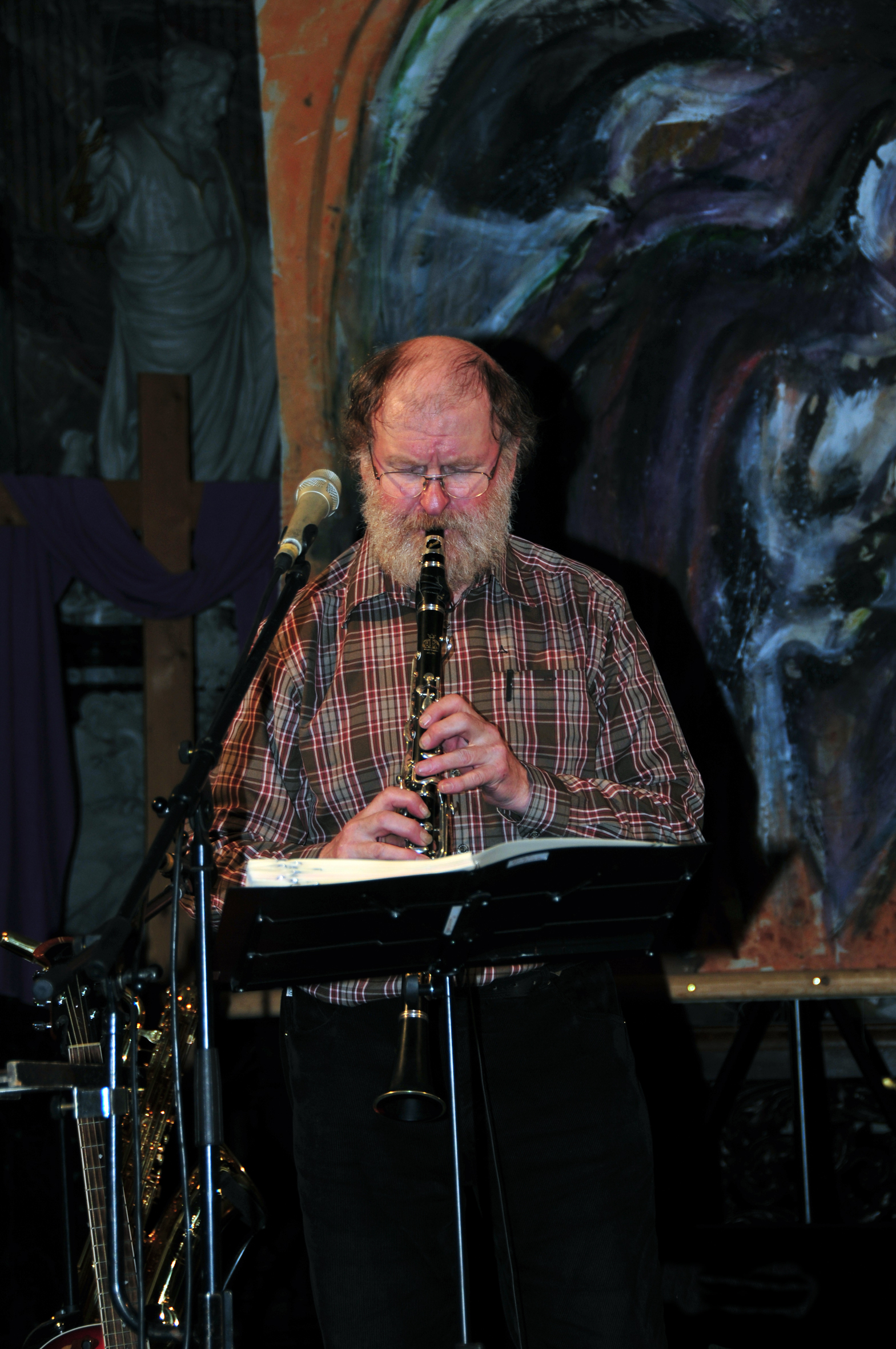 Optreden van Willem Vermandere in de kerk van de gemeente Schelle. (Prov. Antwerpen)